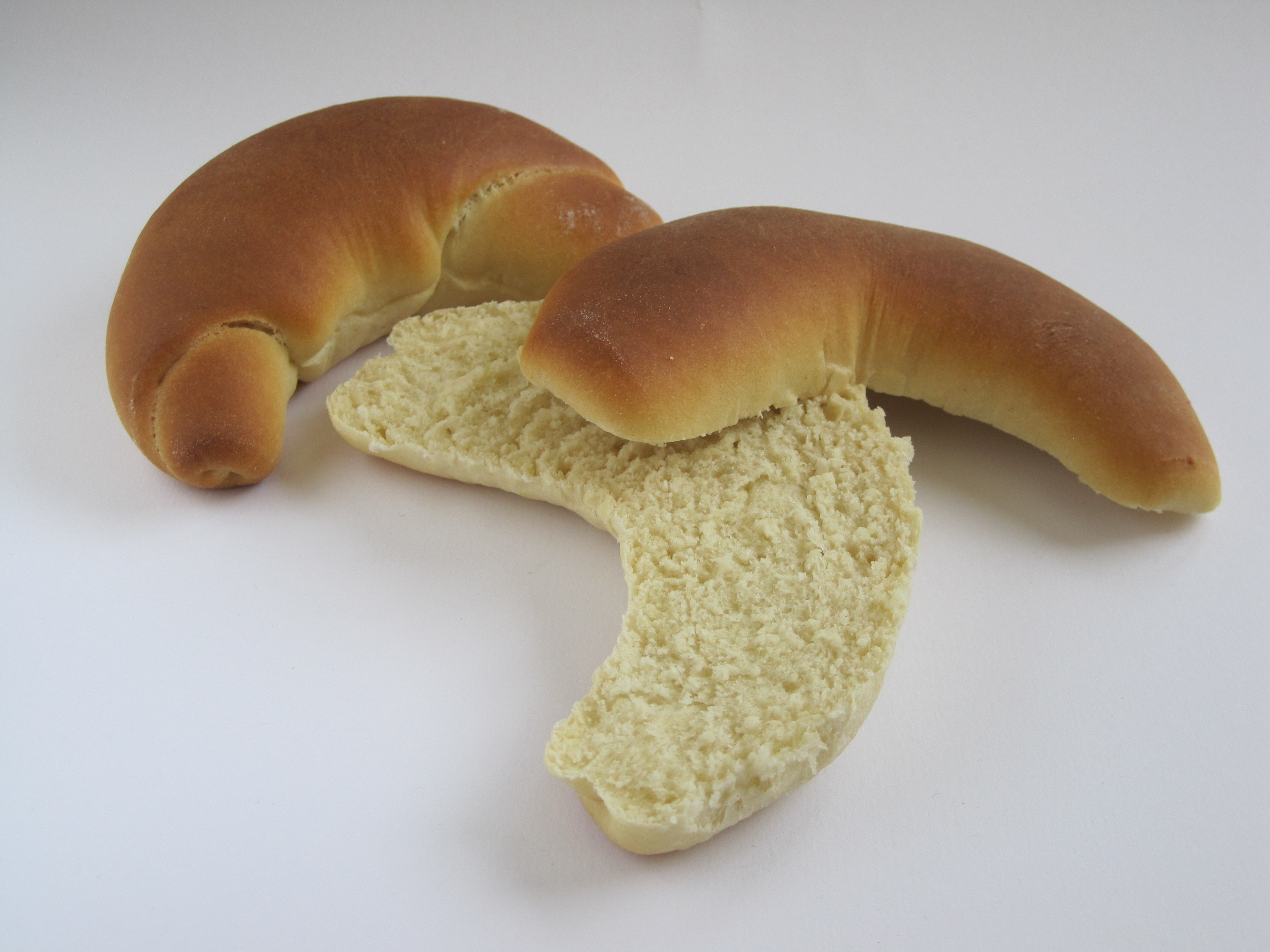 Milchhörnchen (süße Hörnchen), hergestellt mit Pâte fermentée und Water roux.